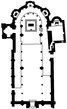 Pianta non in scala della chiesa dell'abbazia di Sant'Antimo, in provincia di Siena.